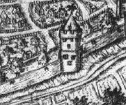 Adlerturm Dortmund, Detail des Plans von Detmar Mulher